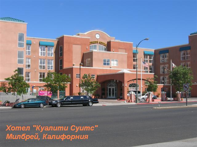 Хотел "Куалити Суитс" на бул "Ел Камино Реал" в Милбрей (авторска снимка)